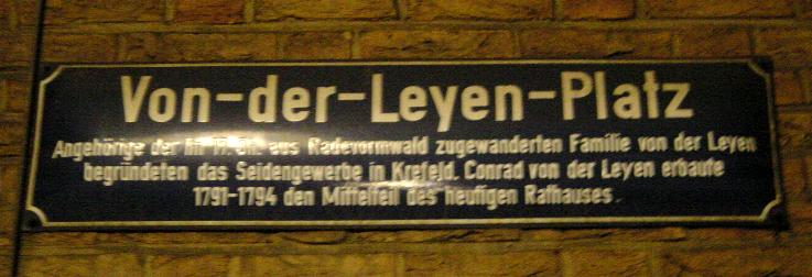 Bildbeschreibung: Straßenschild Von der Leyen Platz, Krefeld Quelle: selbst fotografiert Fotograf/Zeichner: DER UNFASSBARE